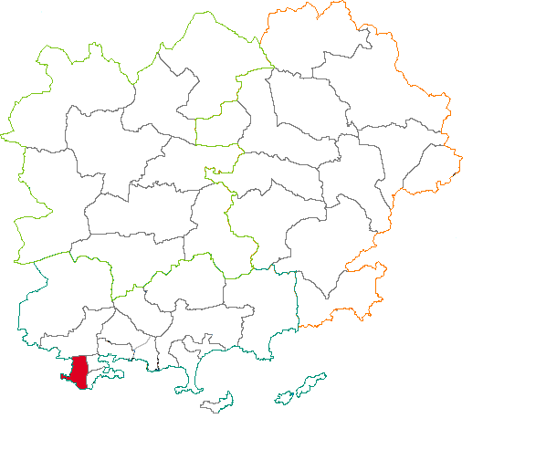 Situation du canton dans la département du Var (83), France